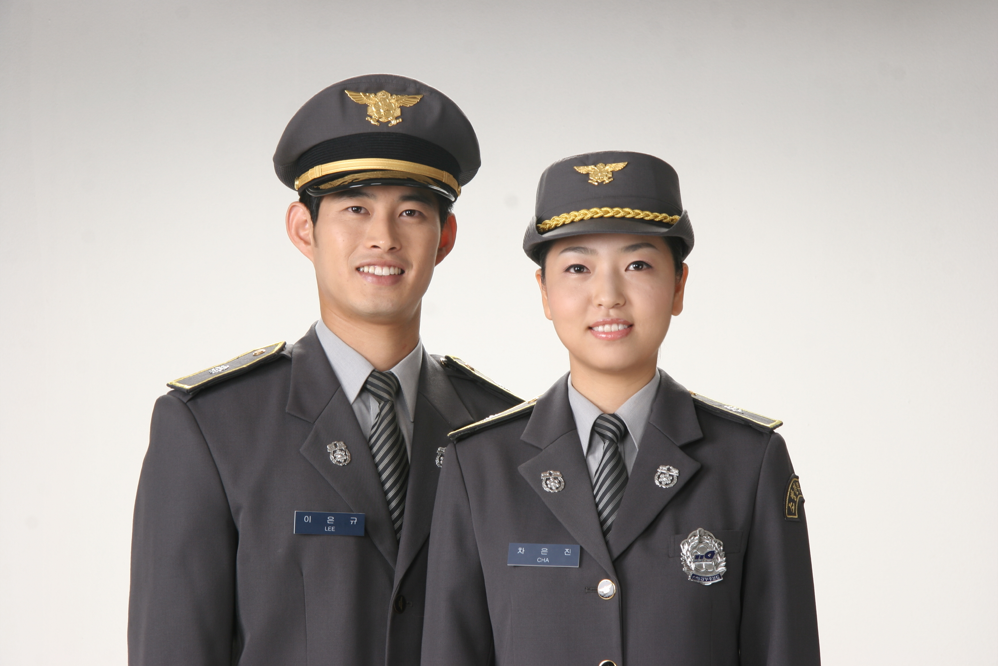 차은진, 이은규. 2005년 9월 제14기 소방간부후보생 모집 시험 홍보 포스터 촬영